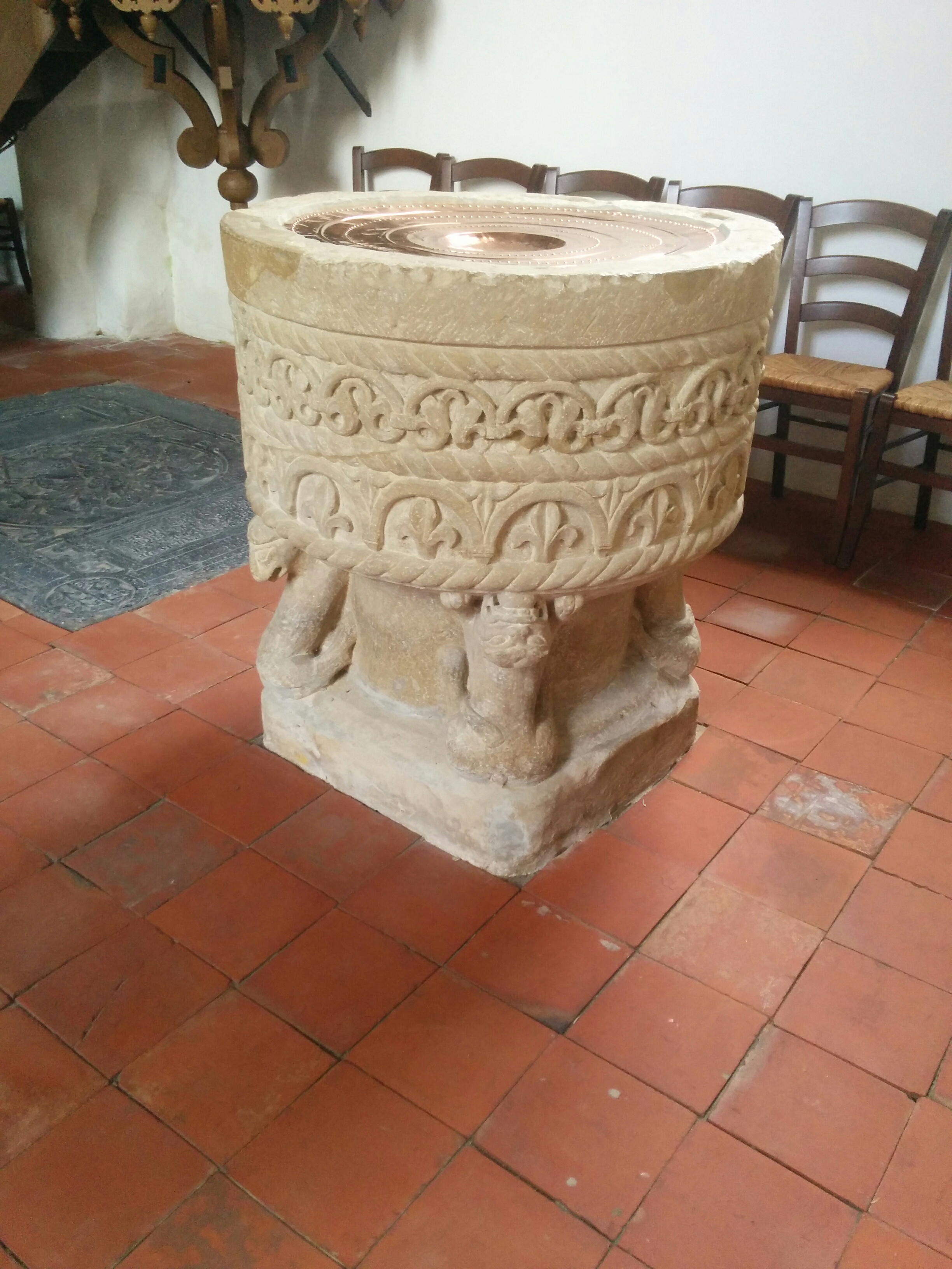 Taufstein der Kirche in Hatzum